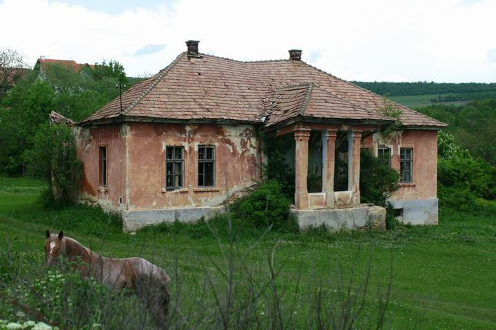 dilapidated mansion in Pruniș village, Ciurila, Romania